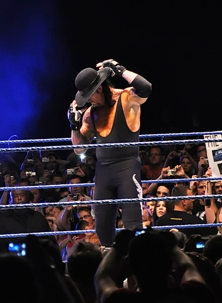 wwe legend undertaker